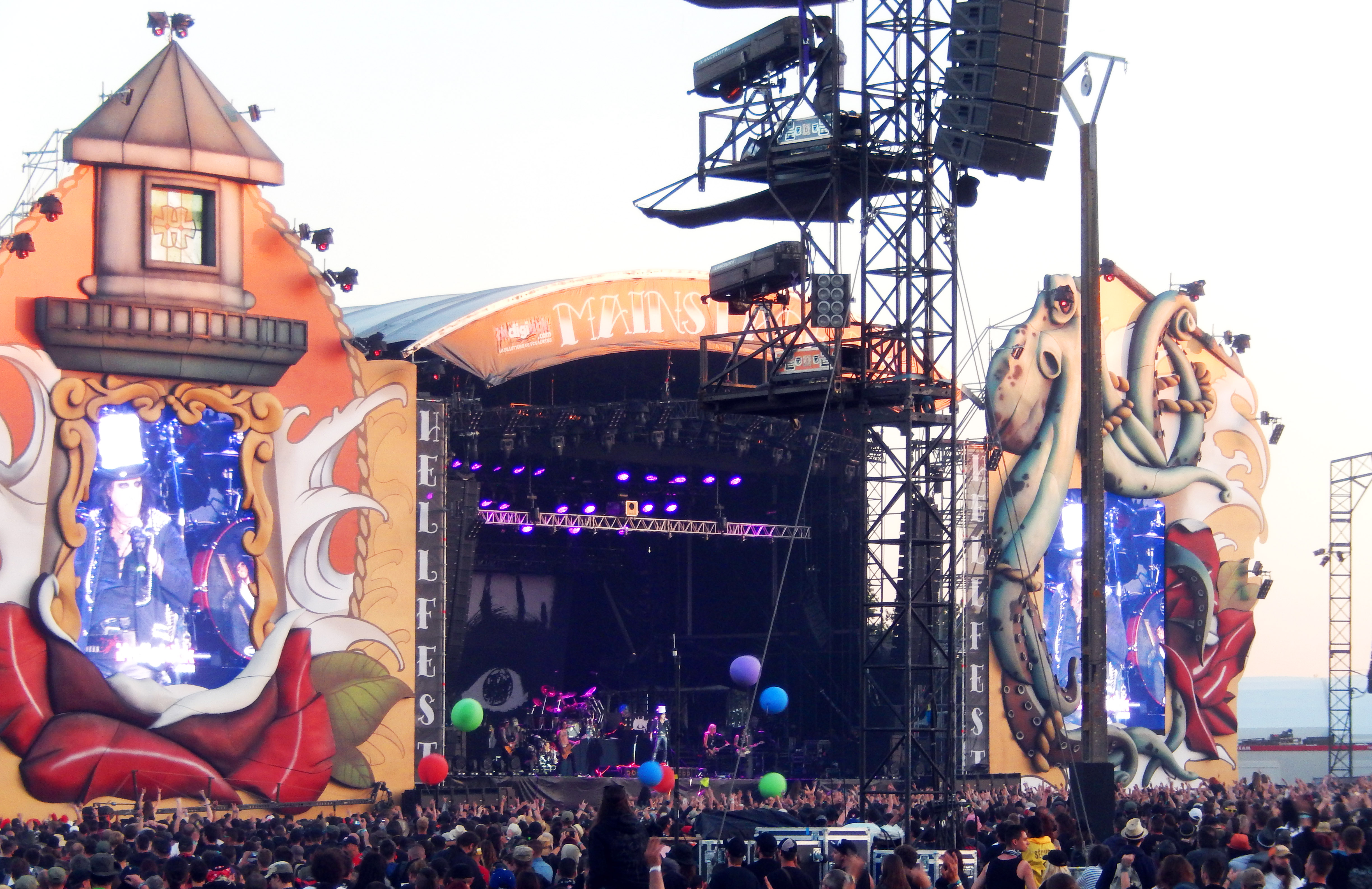 Alice Cooper au Hellfest 2015